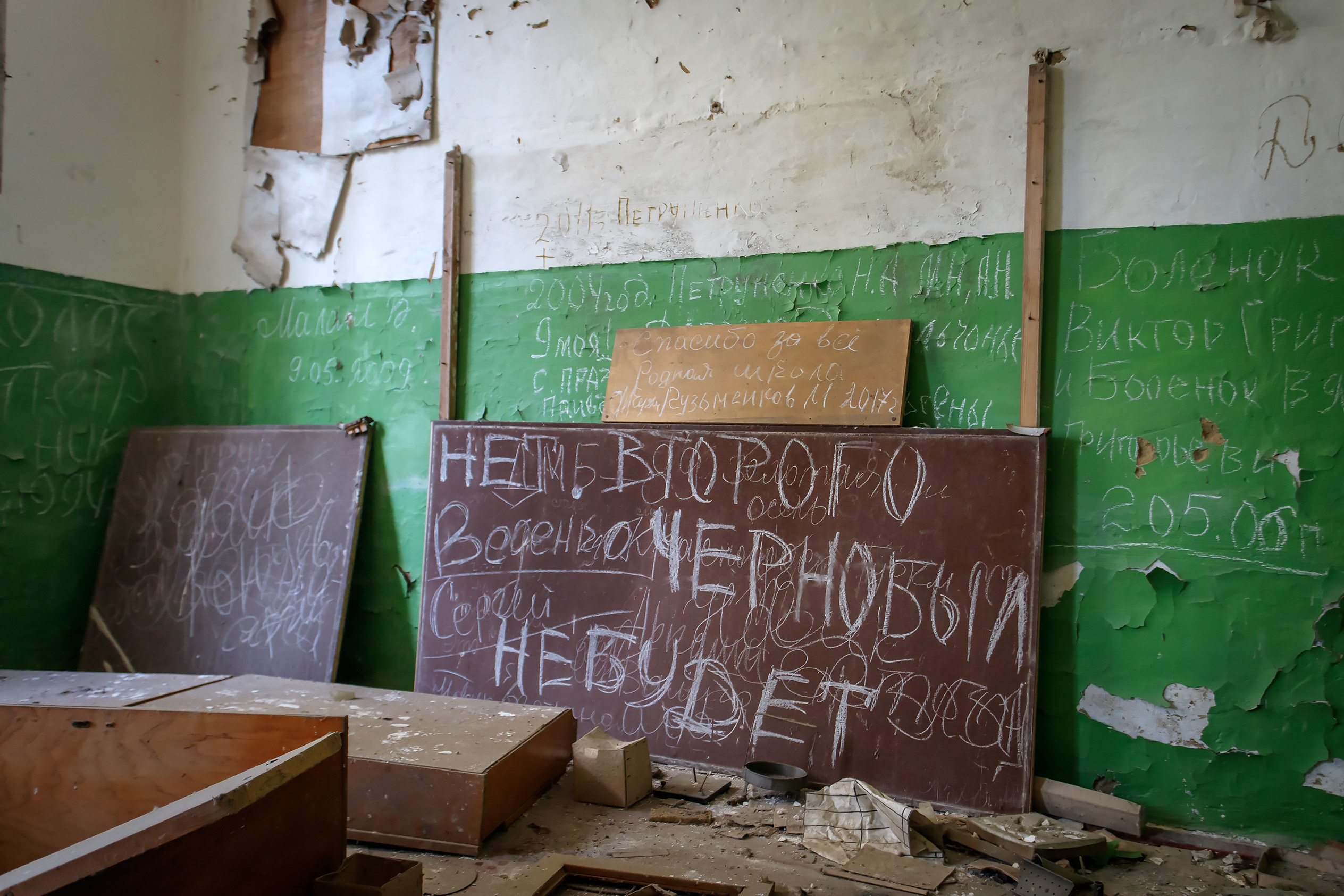 Восьмилетняя школа в дер. Борщевка